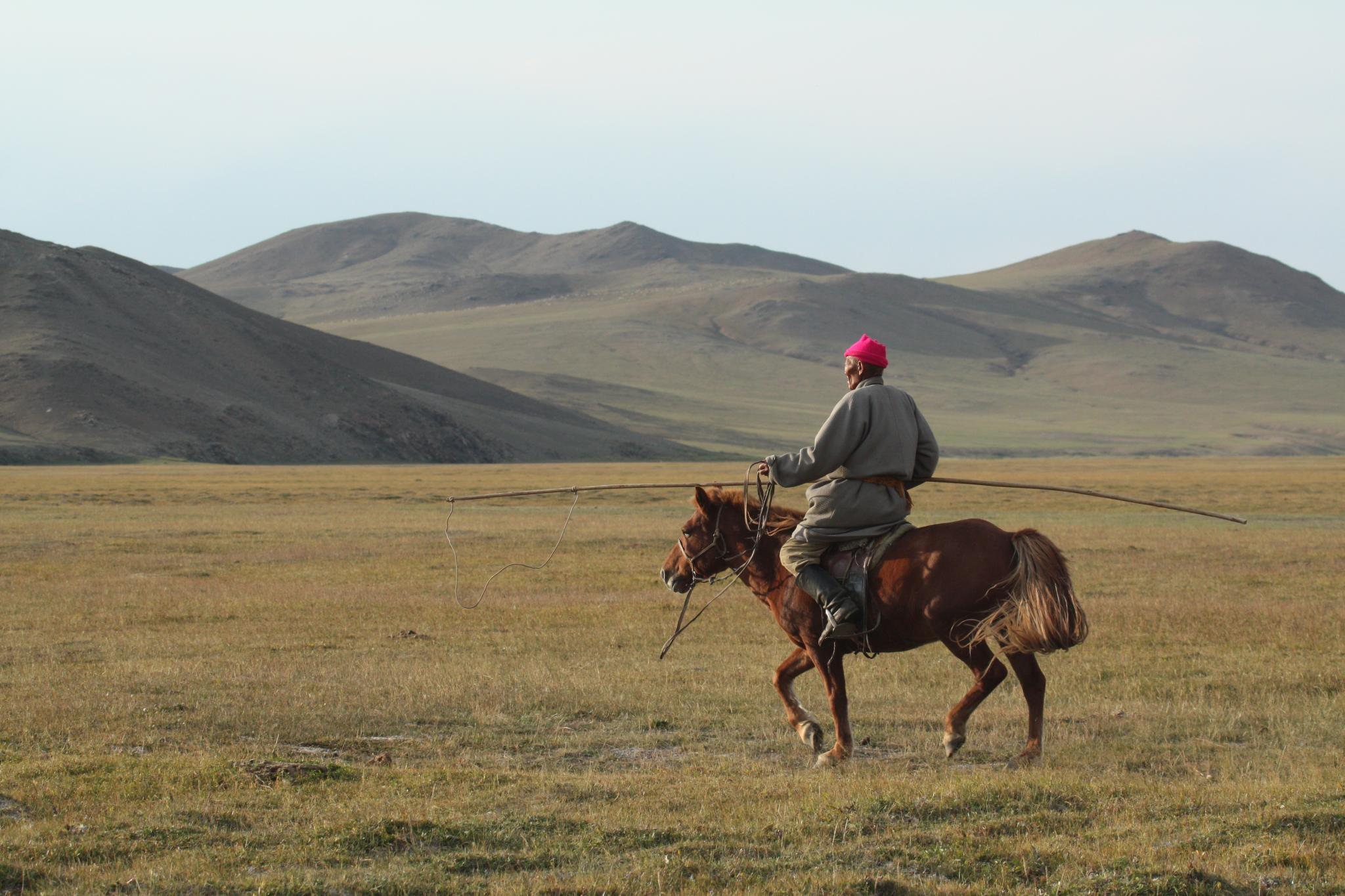 Mongolian Cowboy